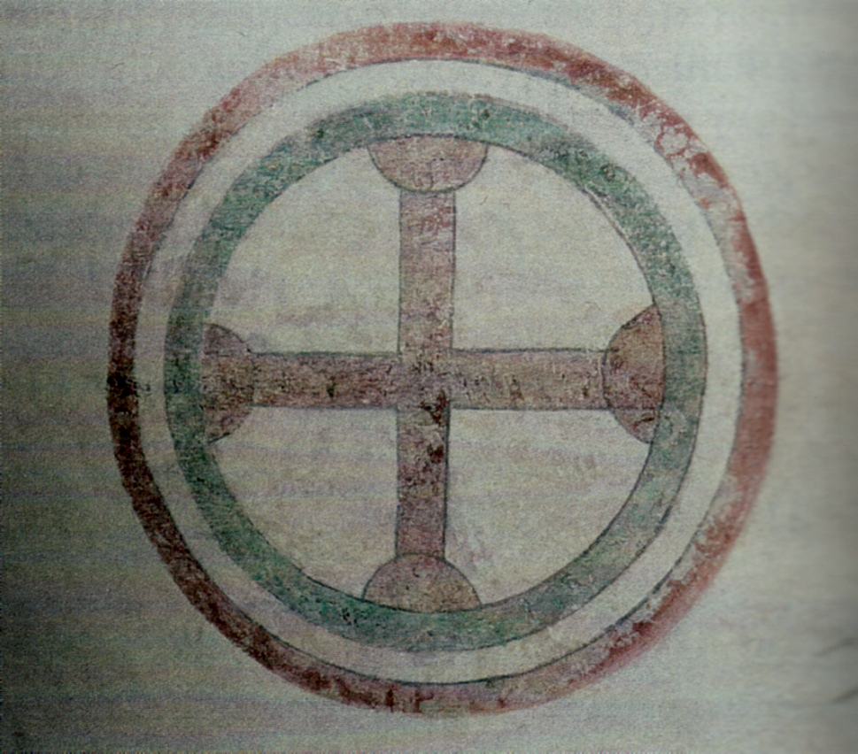 Evangelische Kirche St. Laurentius in Dassel, Niedersachsen, Deutschland - Apostelkreuz von 1477